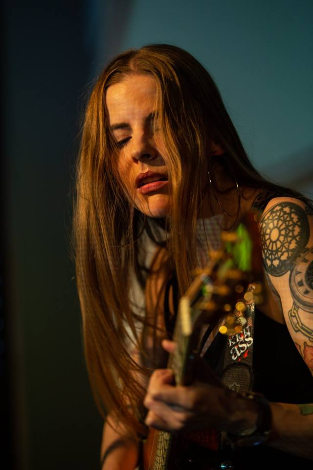 Marta Zalewska- finalistka konkursu Czwórki Polskiego Radia "Wydaj płytę z Będzie głośno!”.